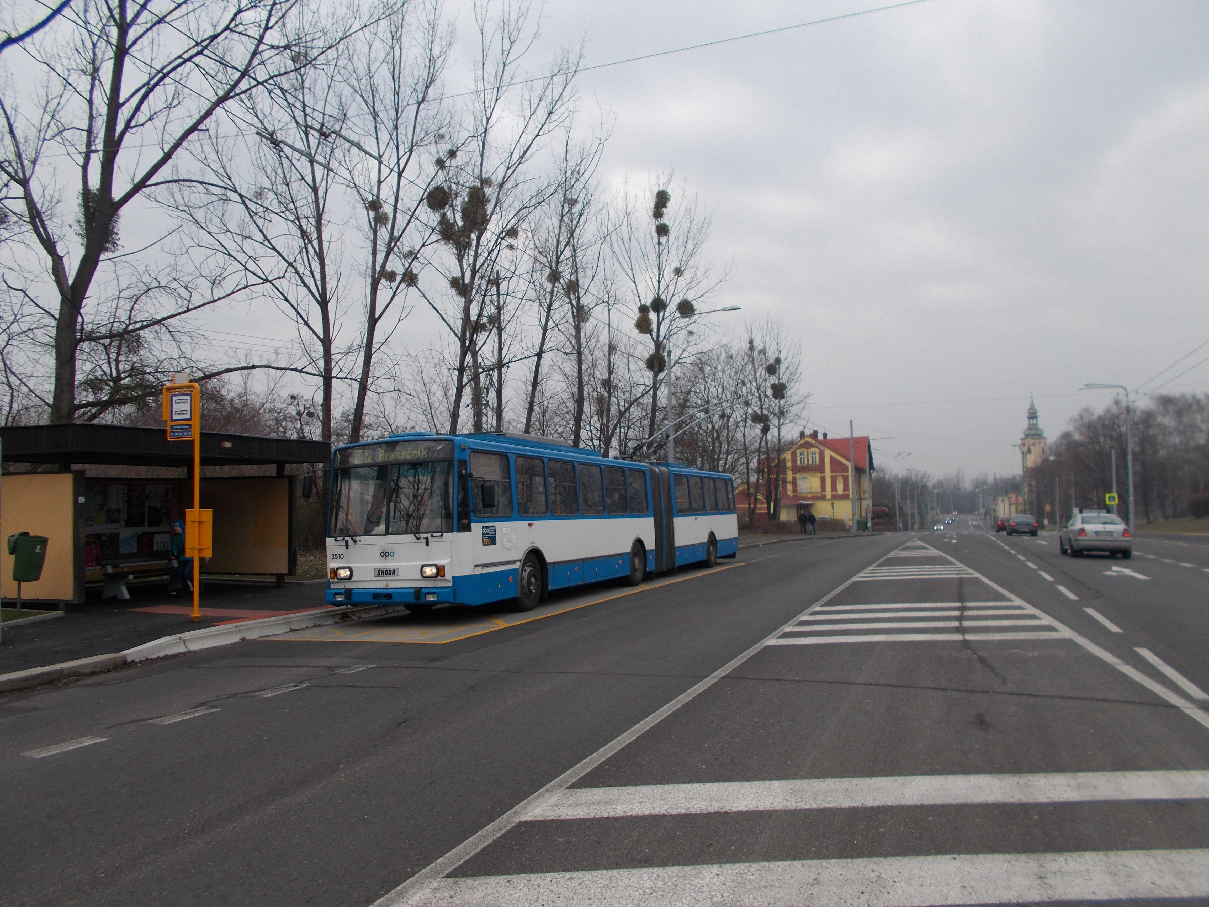 Škoda 15Tr na zastávce Slezská Ostrava hřbitov